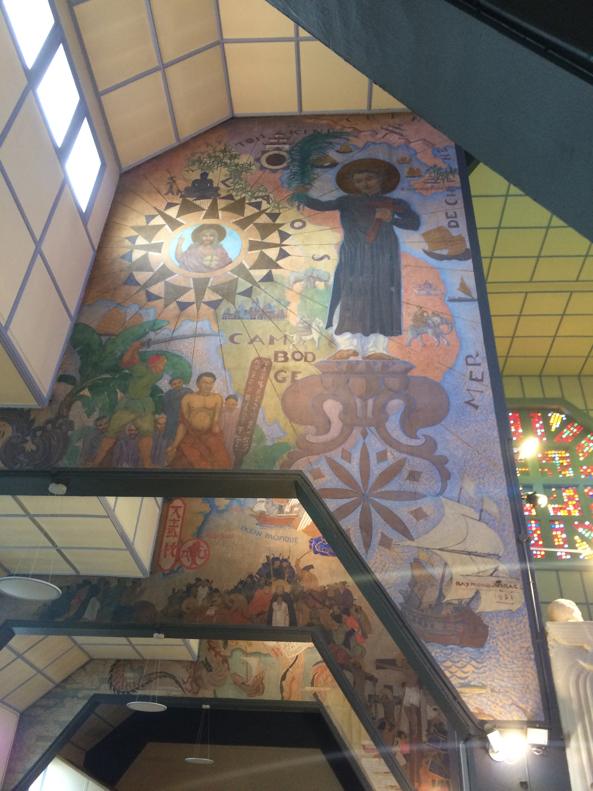 Une fresque de Raymond Virac sur l'évangélisation de la Cochinchine à l'Église Notre-Dame-des-Missions d'Épinay-sur-Seine